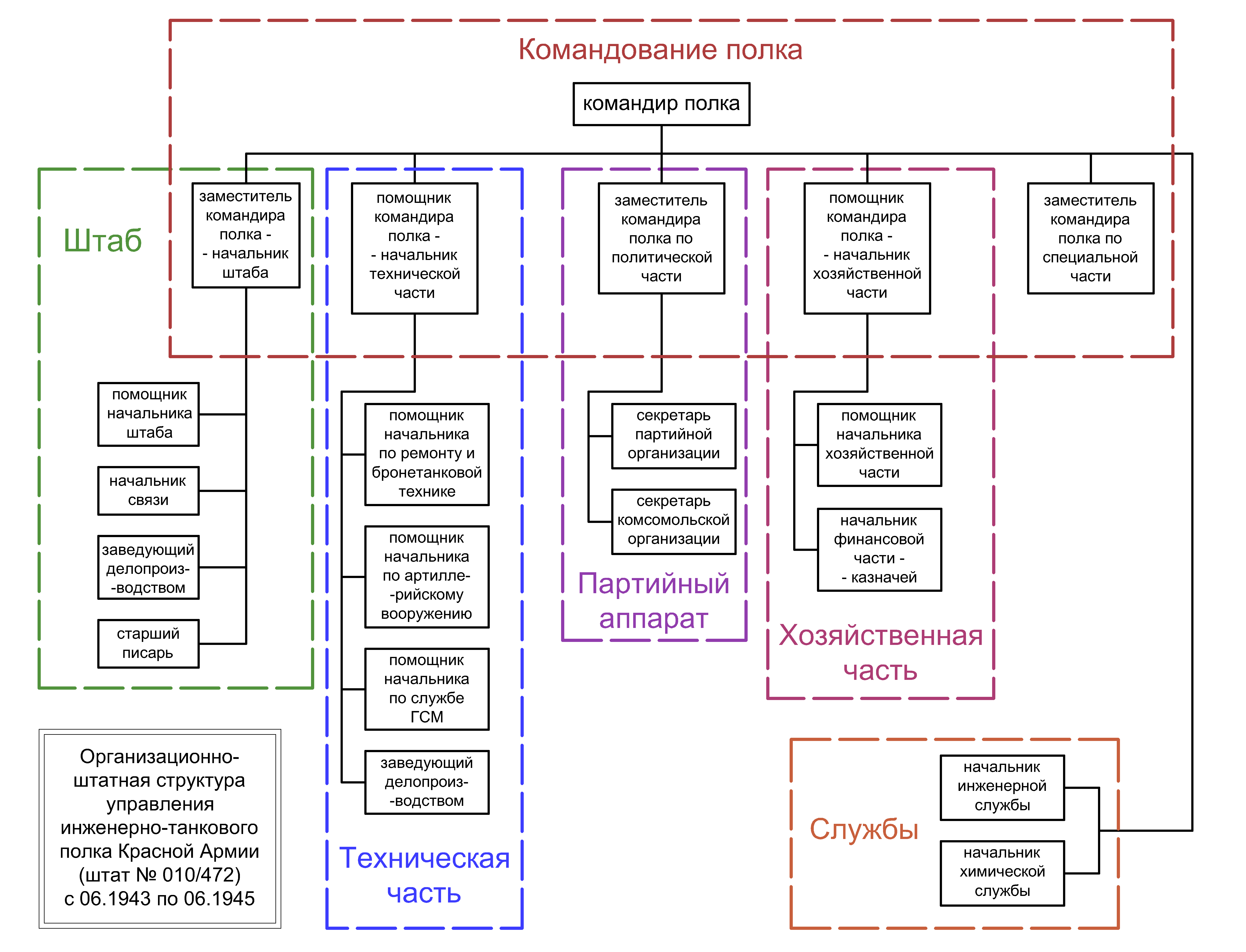 Организационно-штатная структура управления инженерно-танкового полка Красной Армии (штат № 010/472) с 06.1943 по 06.1945. Источник - Никифоров. Штурмовые бригады Красной Армии в бою. — М.: Яуза, Эксмо, 2008.